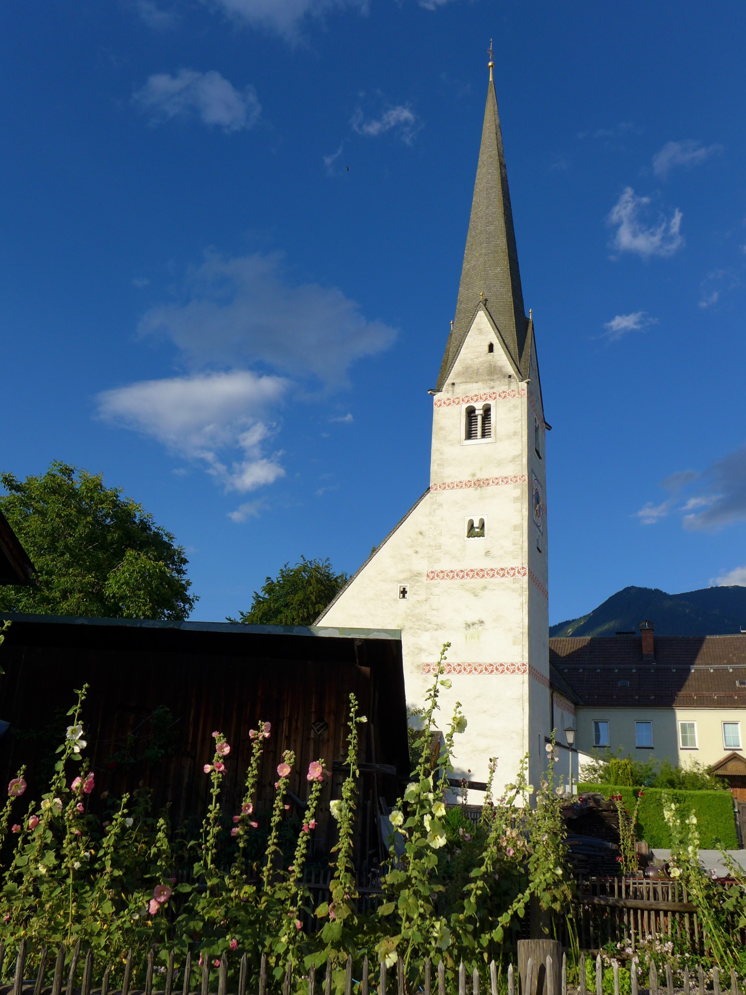 Alte Pfarrkirche St. Martin (Garmisch-Partenkirchen), Turm der Kirche